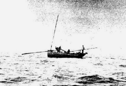 Bateau sardinier en pêche près de l'Île de Sein vers 1904 (Revue "Le Tour du Monde", article La Bretagne du Sud par Gustave Geffroy)